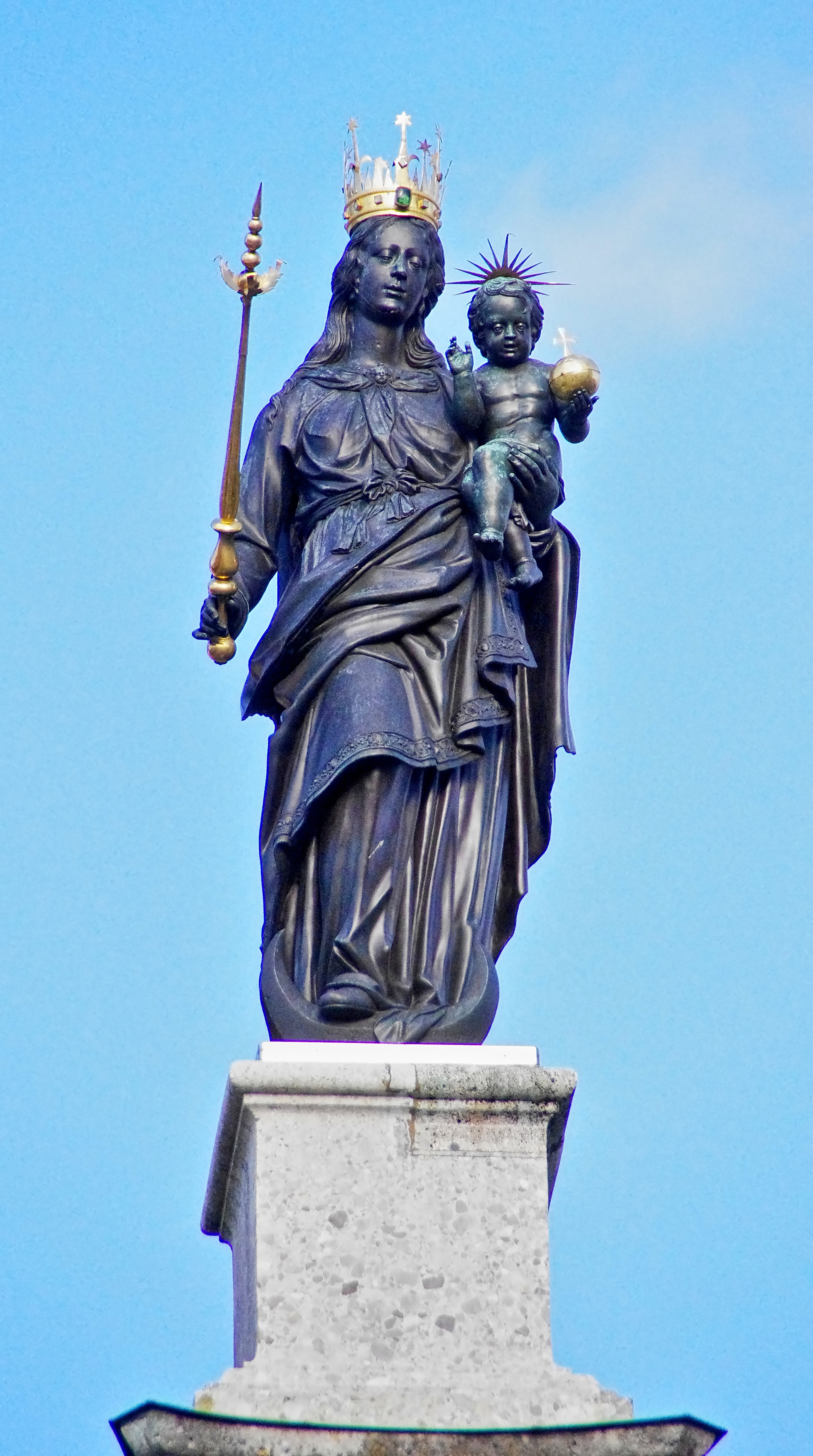 Konstanzer Münster, Mariensäule